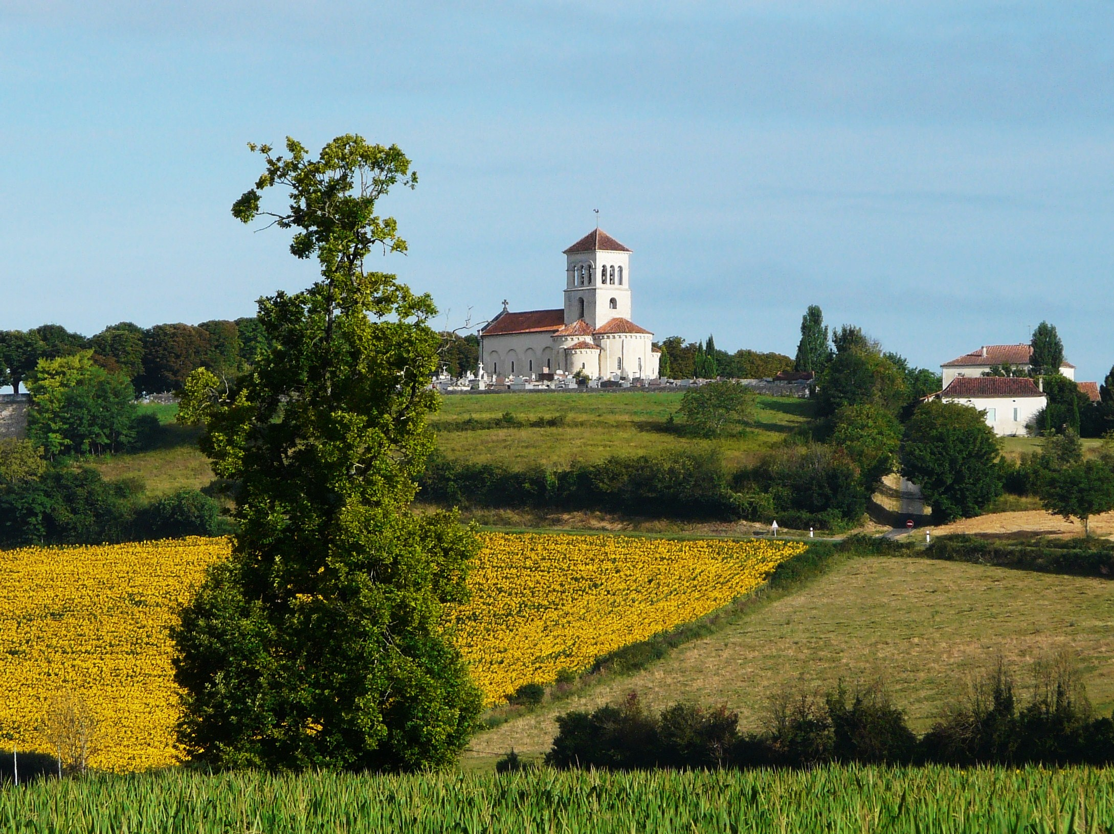 L'église de Montagrier